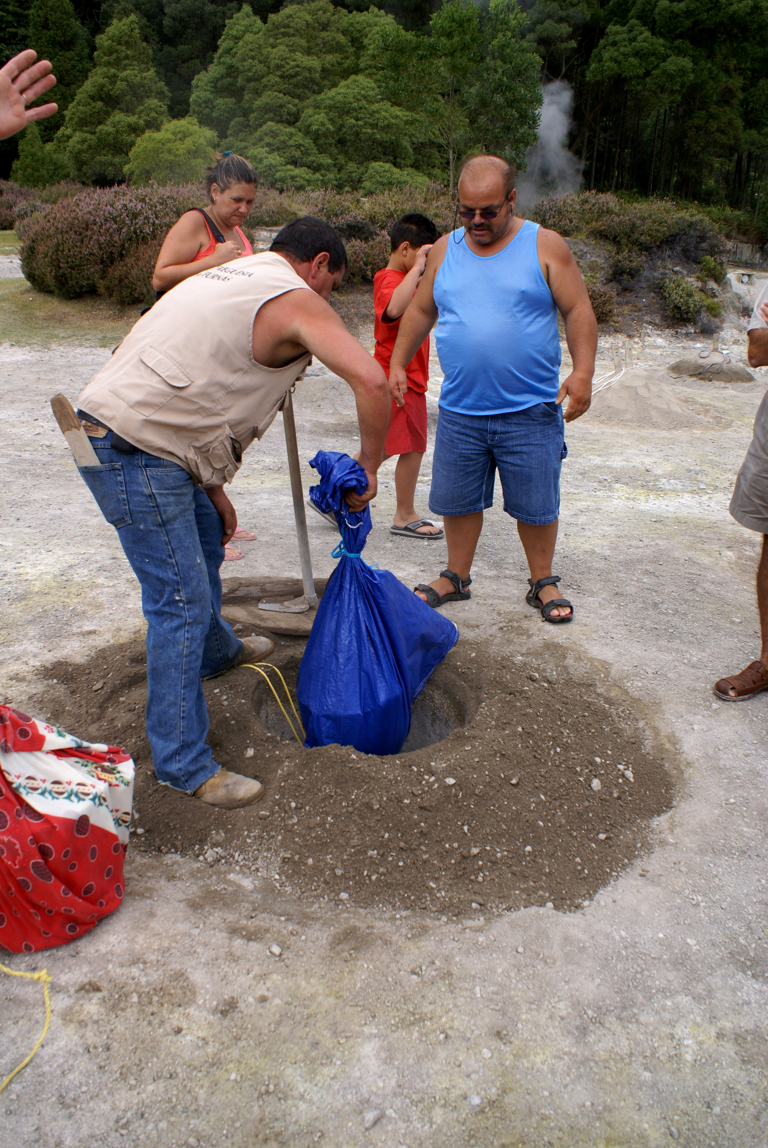 Introdução do cozido na terra vulcânica onde o mesmo se irá cozer. Furnas, Povoação, ilha de São Miguel, Açores